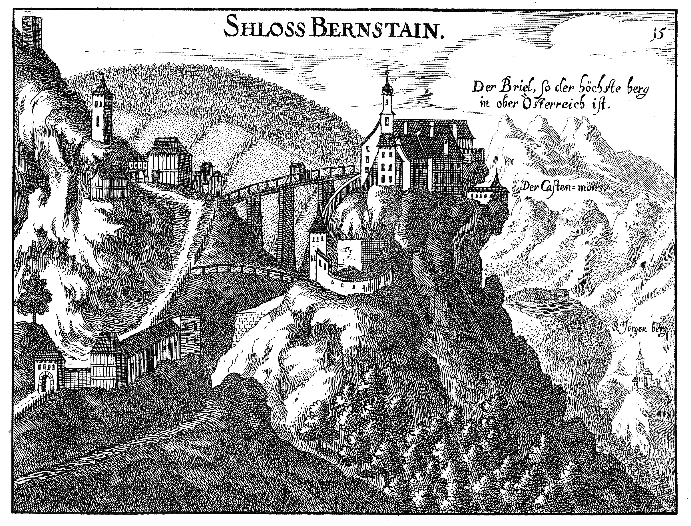 Ansicht von Bernstain (Burg Altpernstein). Kupferstich von Georg Matthäus Vischer